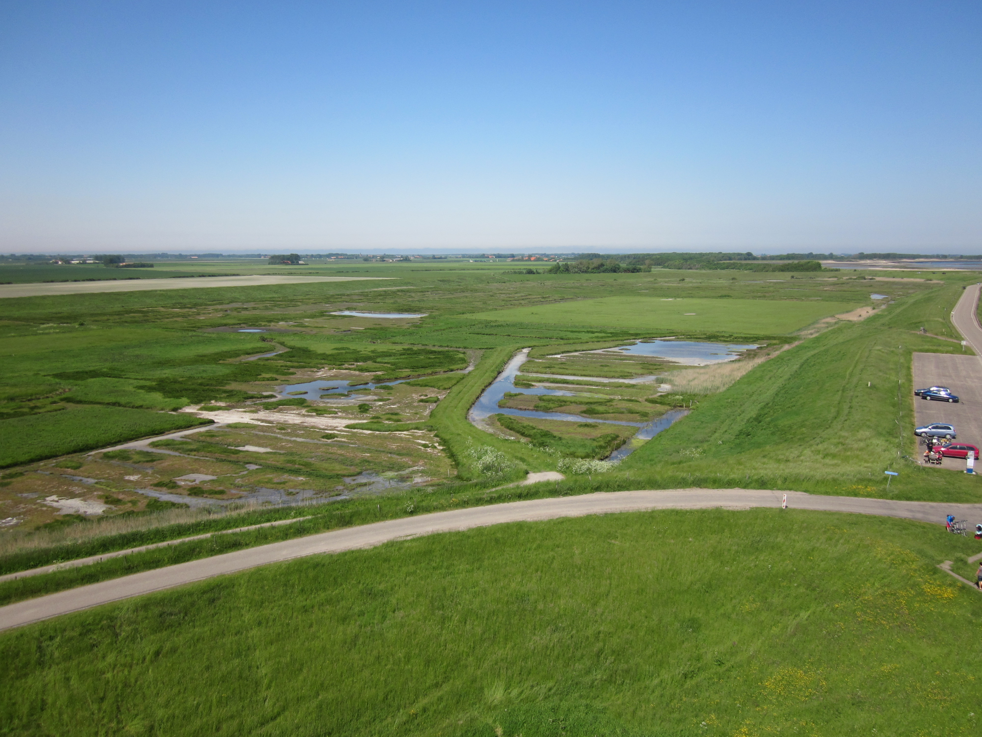 Karrevelden bij de Plompe Toren van Koudekerke